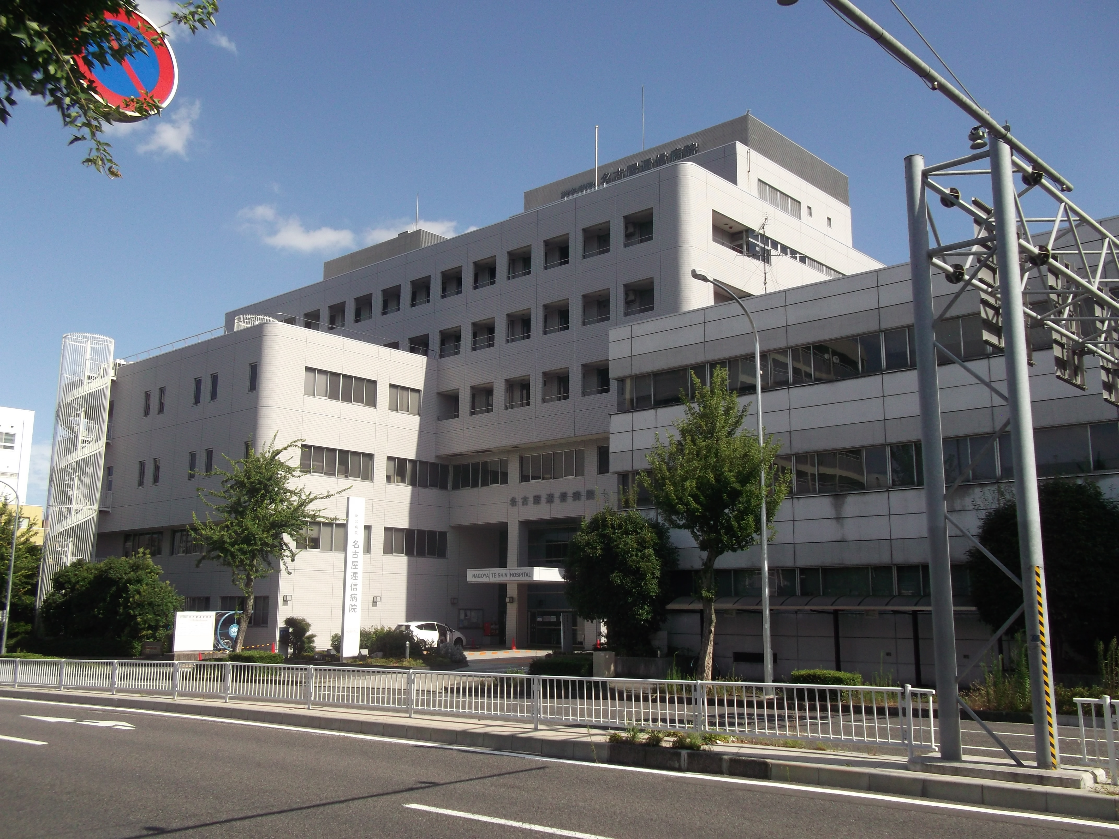 名古屋市東区泉二丁目の名古屋逓信病院を北側公道西側より撮影